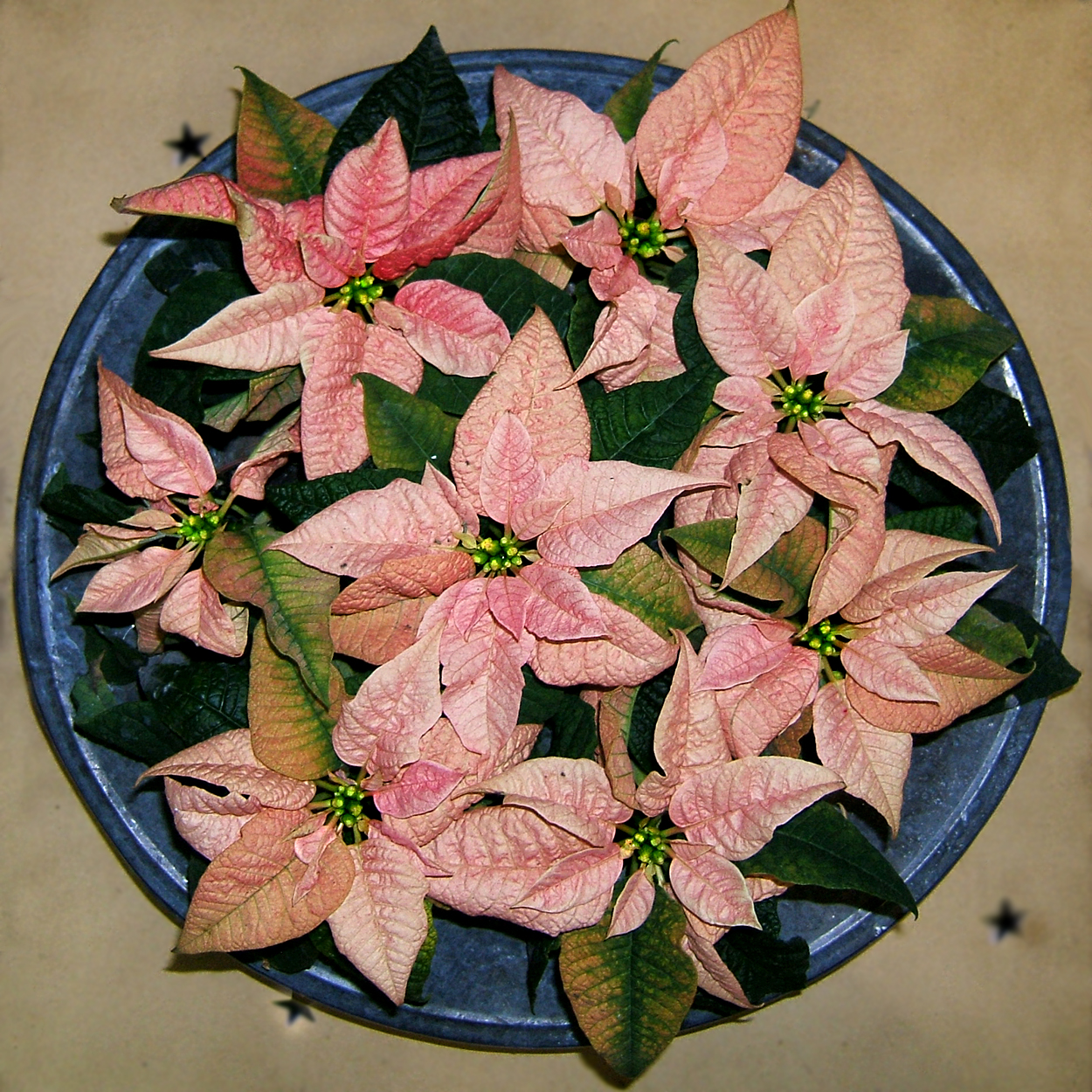 Mini-Weihnachtssterne Euphorbia pulcherrima.